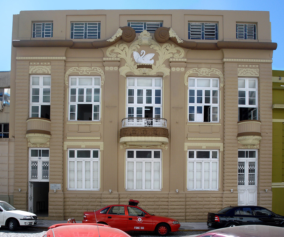 Museu da Brigada Militar, Porto Alegre, Brasil.